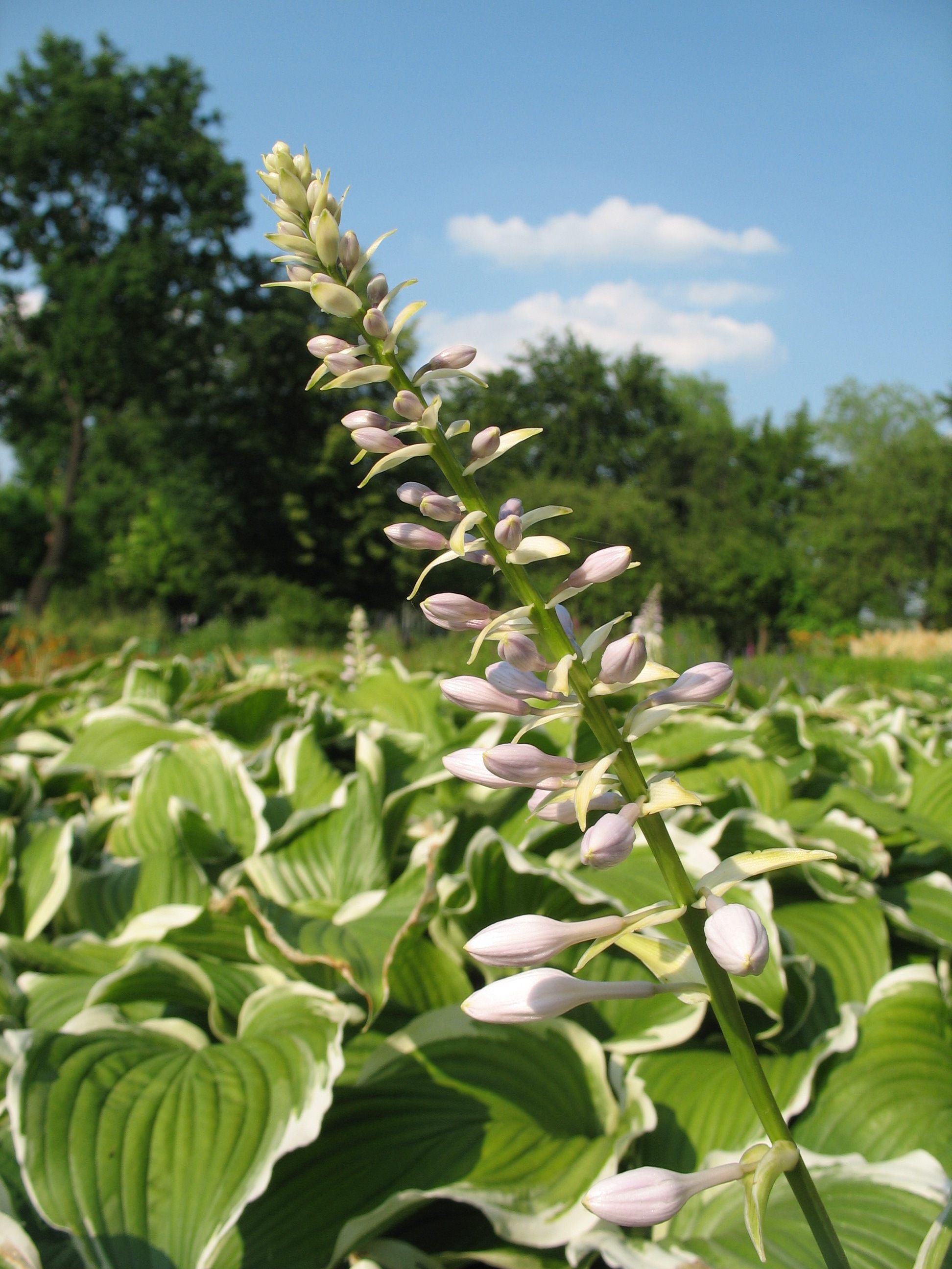 Funkia białobrzeżna (Hosta 'Fortunei Albomarginata'). Zdjęcie wykonane 25.06.2006 w Miejskim Ogrodzie Botanicznym w Zabrzu